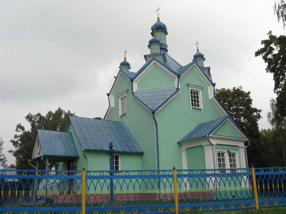 Любішчыцы. Царква